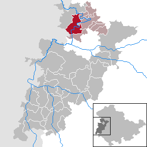 Creuzburg in Thuringia - Wartburgkreis